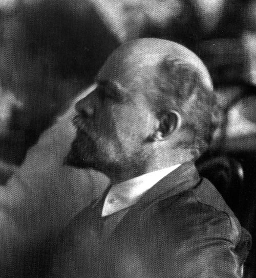 Фрагмент фотоснимка заседания II Конгресса Коминтерна с портретом В. И. Ленина